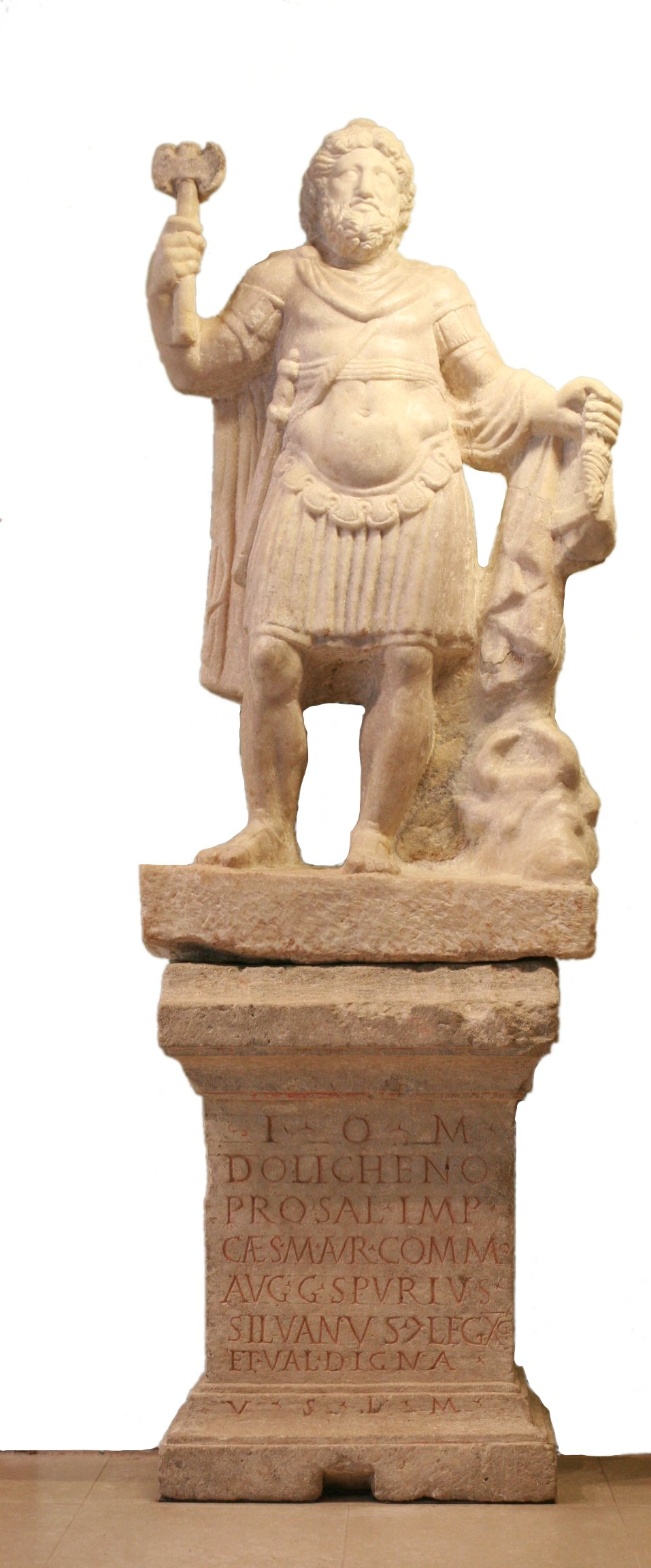 Statue des Jupiter Dolichenus. Doppelaxt in der Rechten und Blitzbündel in der Linke sind die üblichen Hoheitssymbole. Der Stier liegt als Attributfigur am linken Standbein. Die phrygishe Mütze kennzeichnet ihn als Orientalen. Gekleidet ist er als römischer Feldherr.